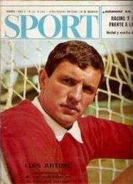 Luis Artime, goleador de Independiente, en la tapa de la revista Sport.